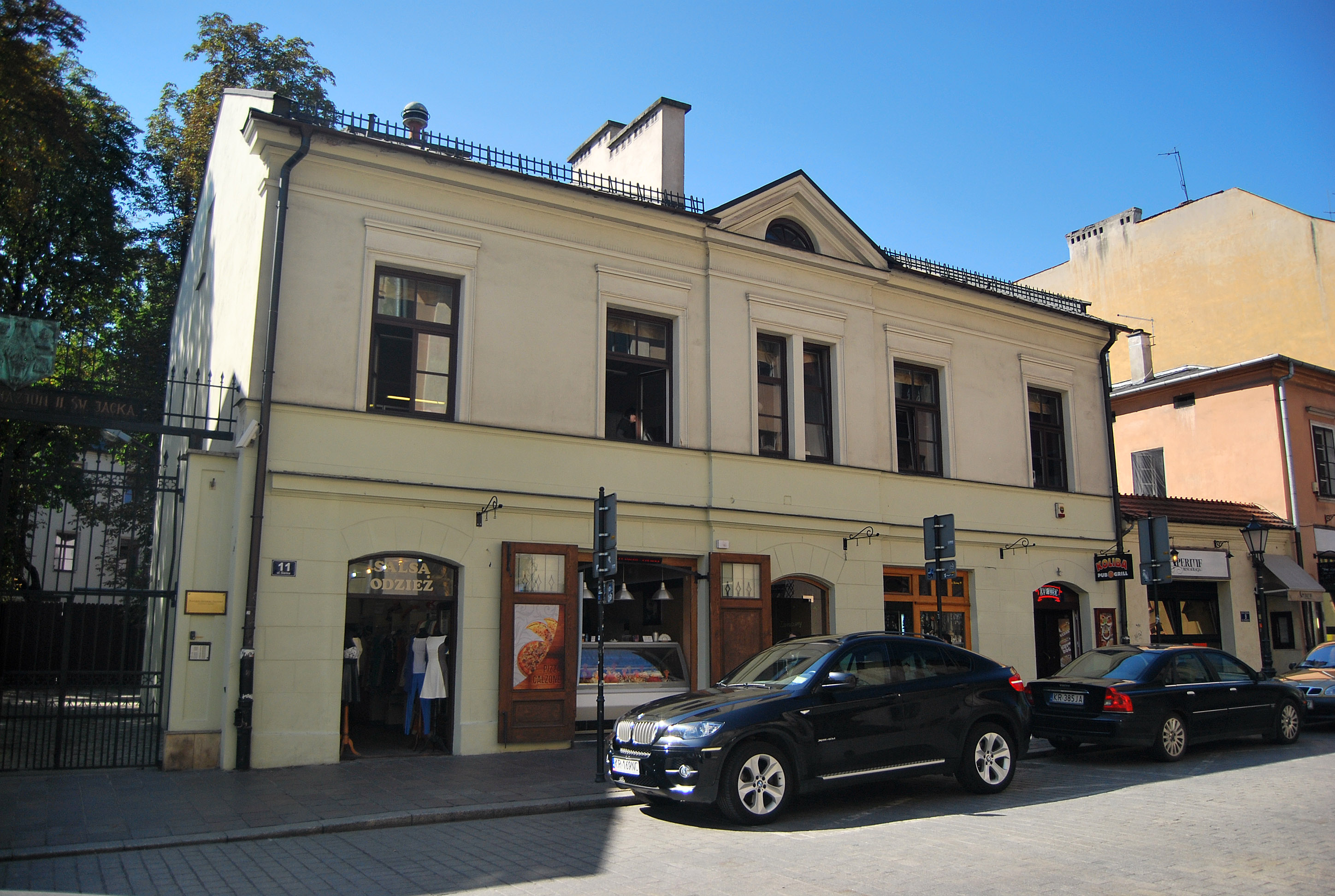 Kamienica (dec. gimnazjum św. Jacka) przy ulicy Siennej 11 w Krakowie, widok od frontu.